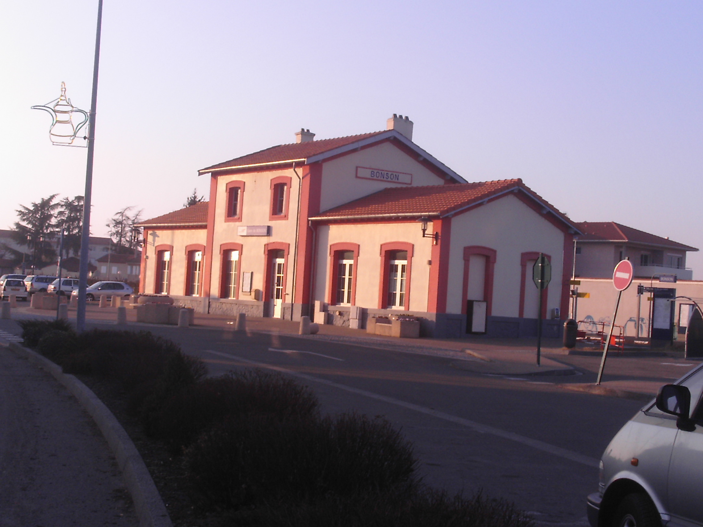 Vue de la gare de Bonson depuis l'avenue de Saint-Rambert (2007)